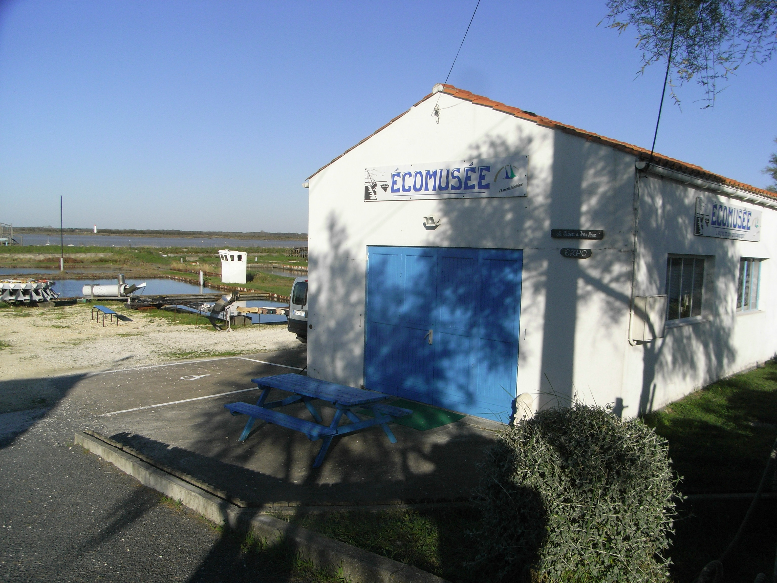 Écomusée de l'huître à Port-des-Barques (Charente-Maritime - France).